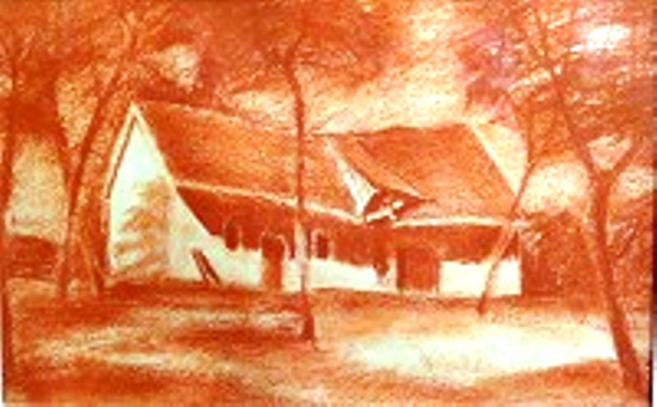 dr. Csics Miklós Ybl-díjas építész grafikája 1955-ből a „Szentendrei Vázlatok” sorozatból